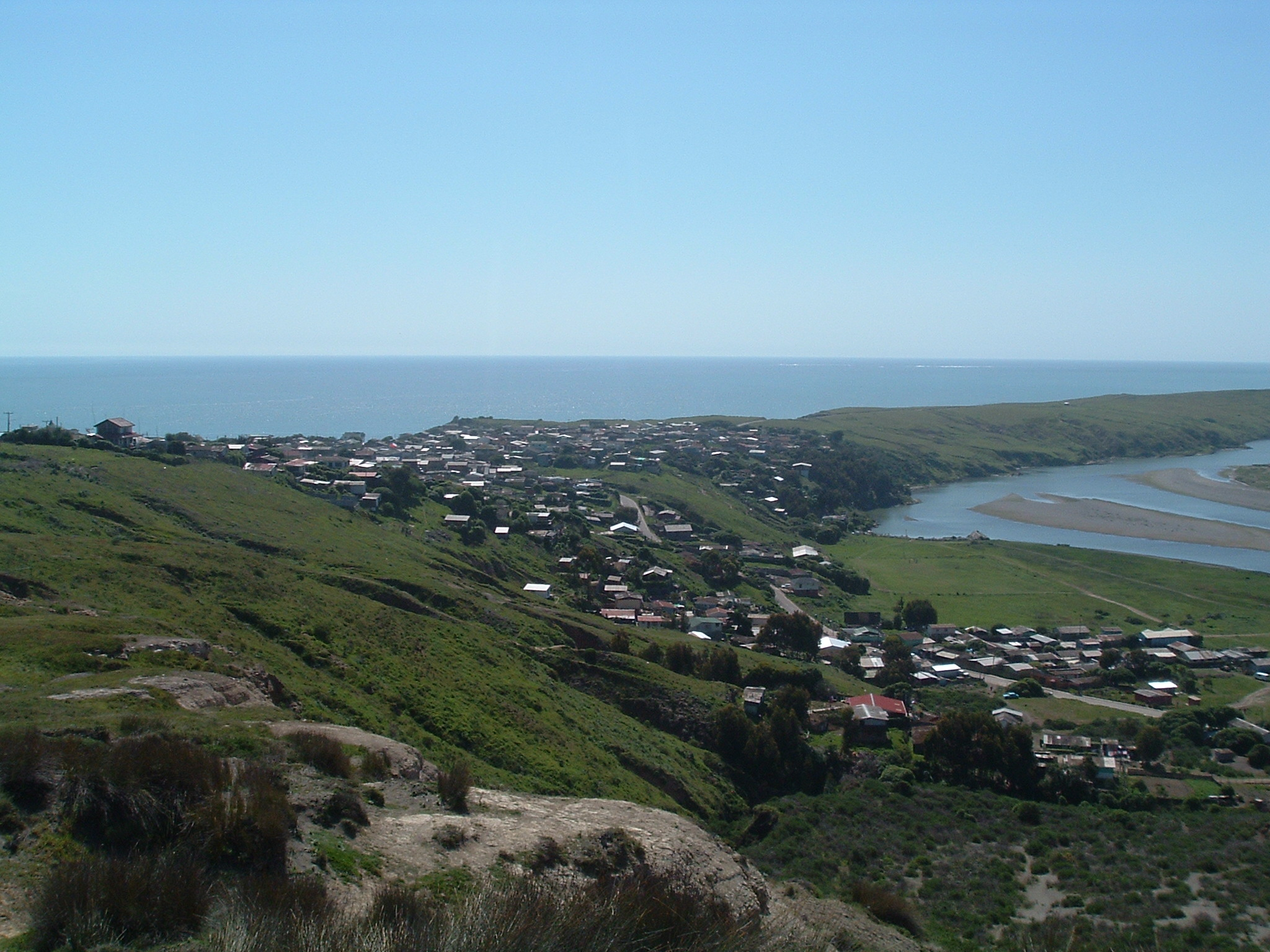 La Boca (Chile) vista desde el mirador de San Pedro.